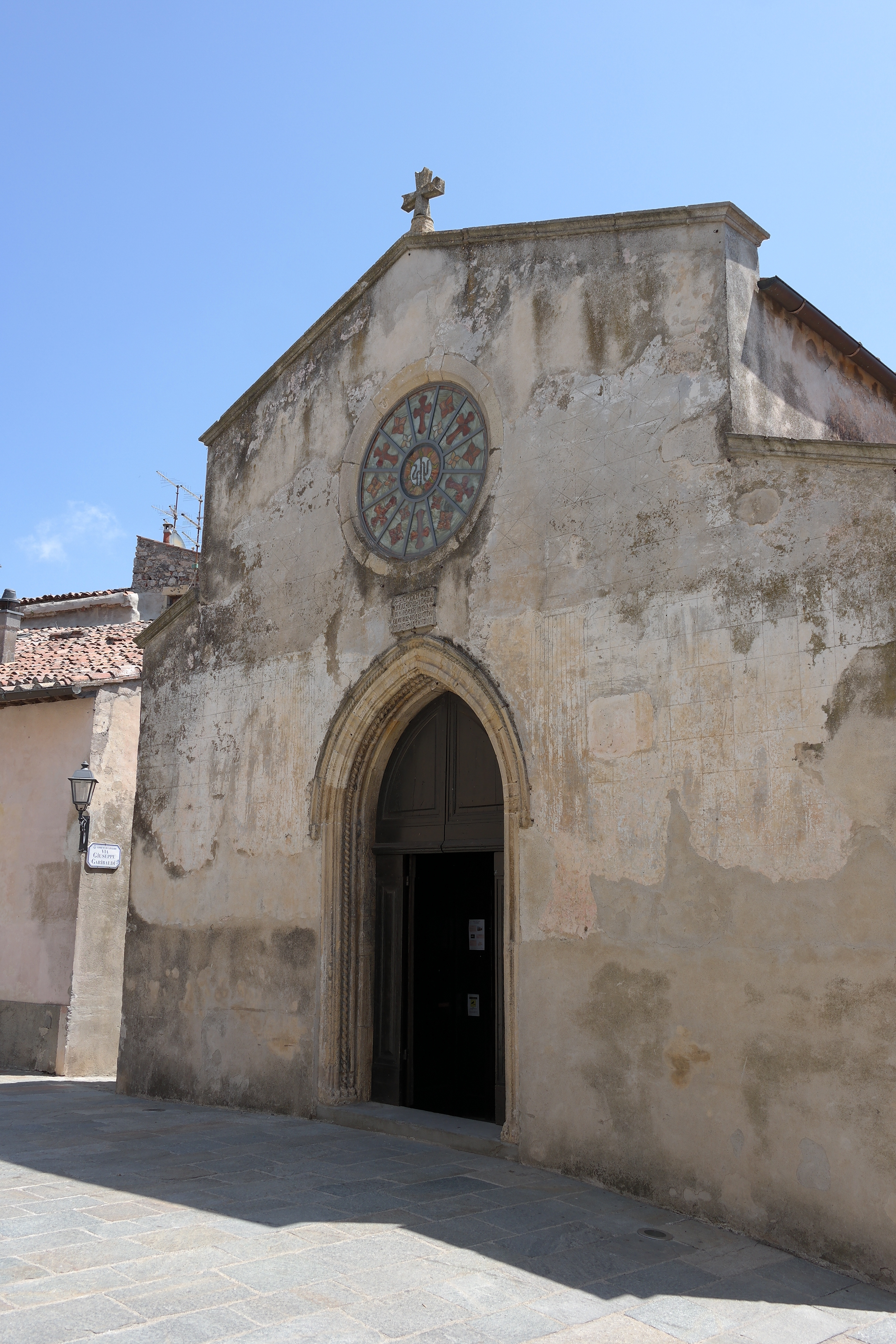 Chiesa di San Nicola a Capalbio